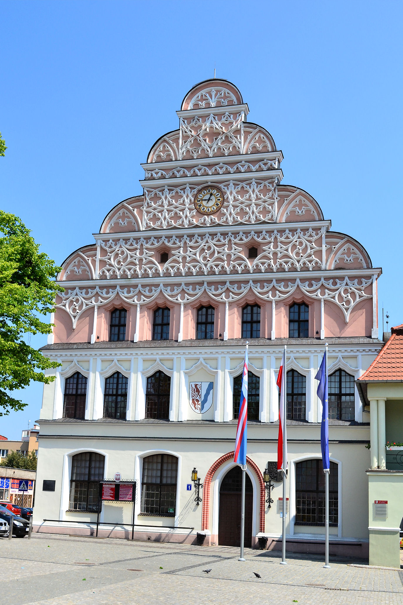 Ratusz w Stargardzie Szczecińskim